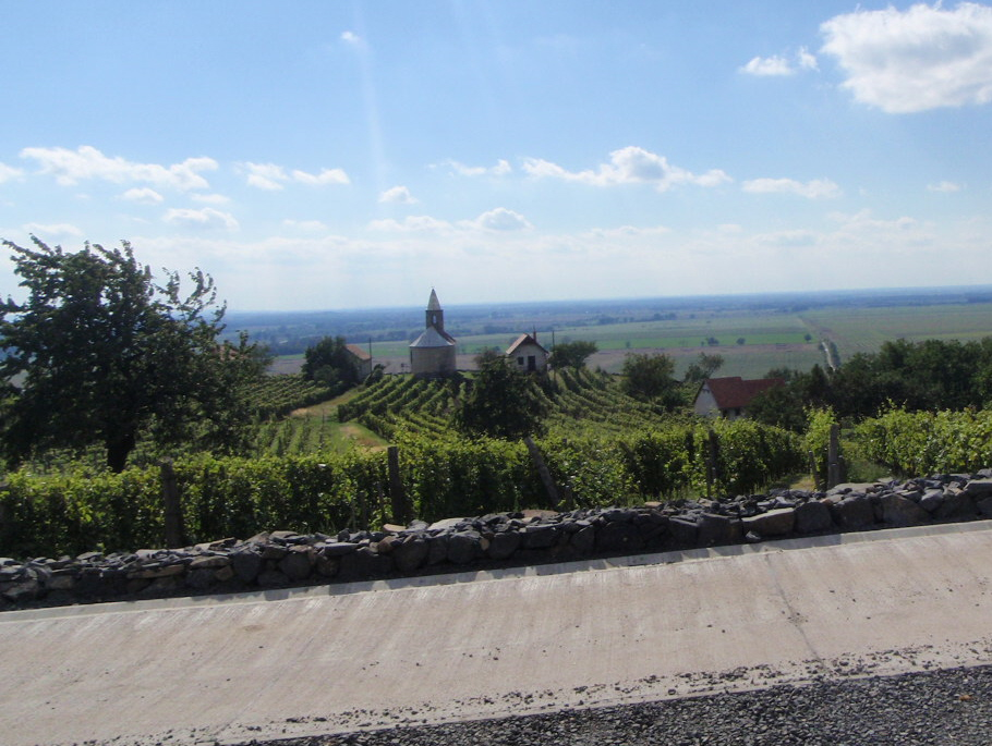 St. Helena Kapelle in Somloerberg